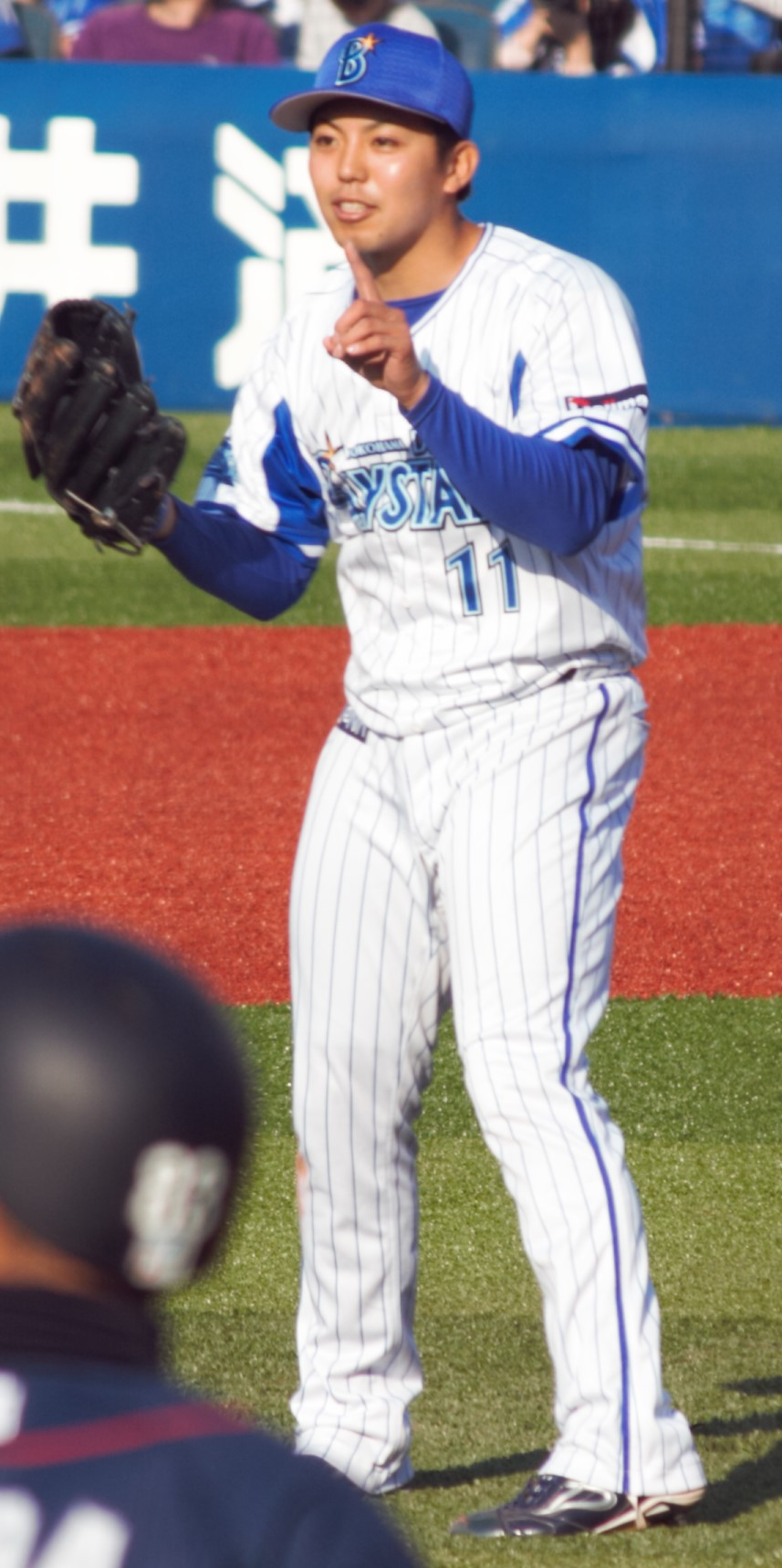 横浜DeNAベイスターズ投手の東克樹。横浜スタジアムにて